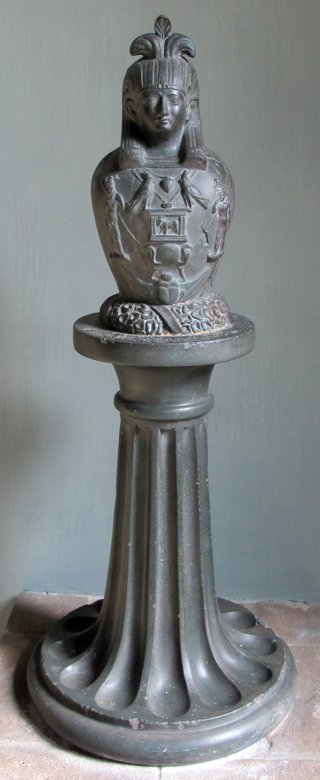 Museo Gregoriano Egizio